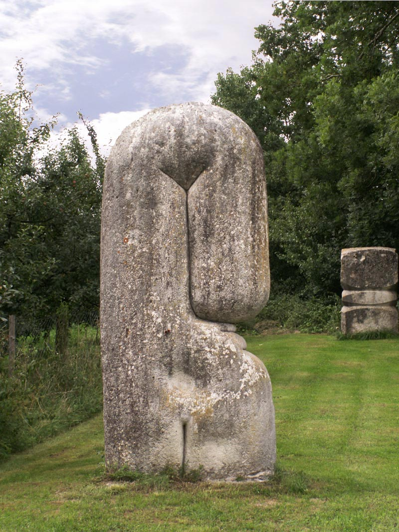 Skulpturenfeld Oggelshausen Bildhauersymposium 1969/70 Herbert George, Kalkstein